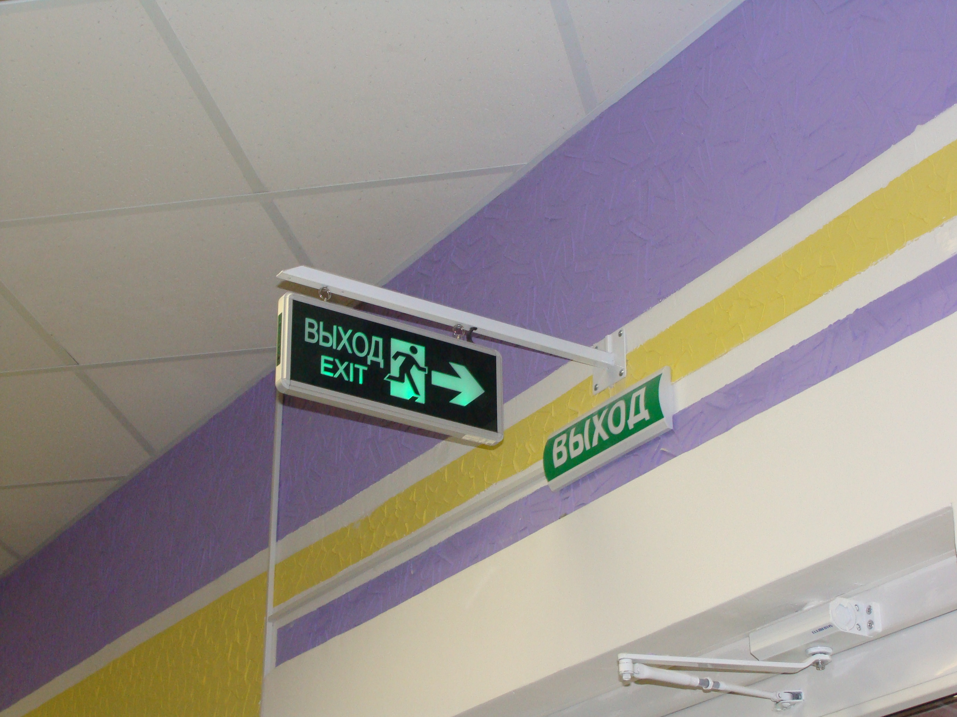 Световые оповещатели Выход, включенные в СОУЭ и в сеть освещения